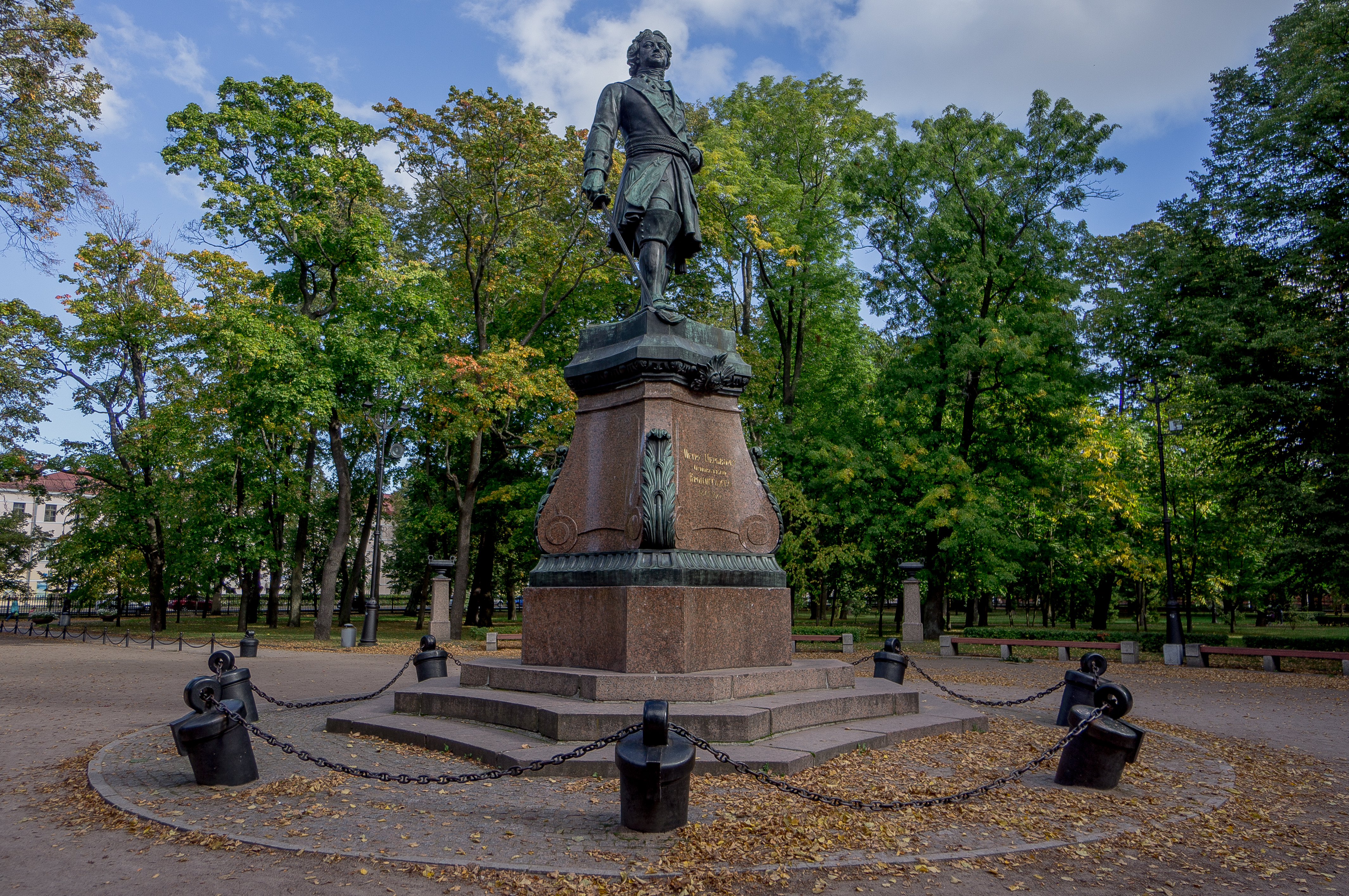 Памятник императору Петру I: Макаровская улица, Кронштадт, Кронштадтский район, Санкт-Петербург